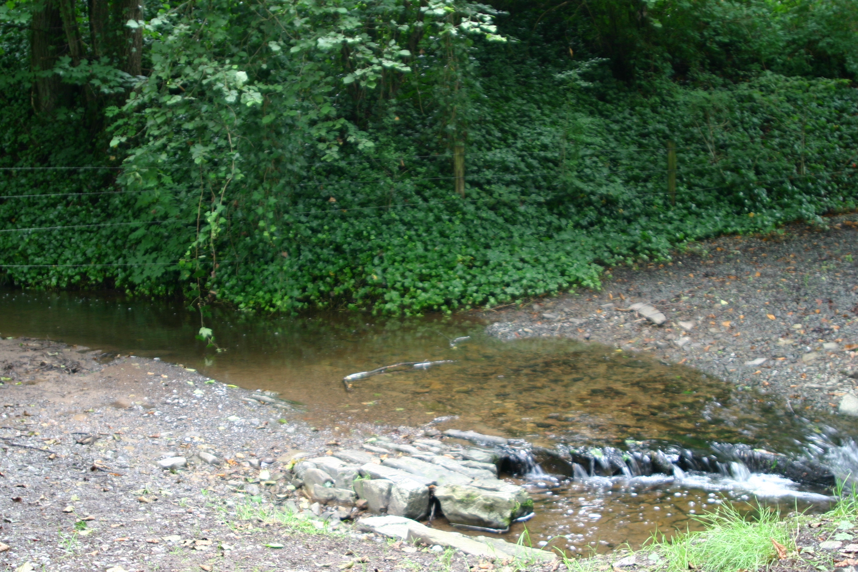 De Ruisseau du Pourceau Pré op der Furt just virum Zesummelaf mat dem Pouhon beim Schlass vu Grimonster. Kategorie:Baachen an der Belsch